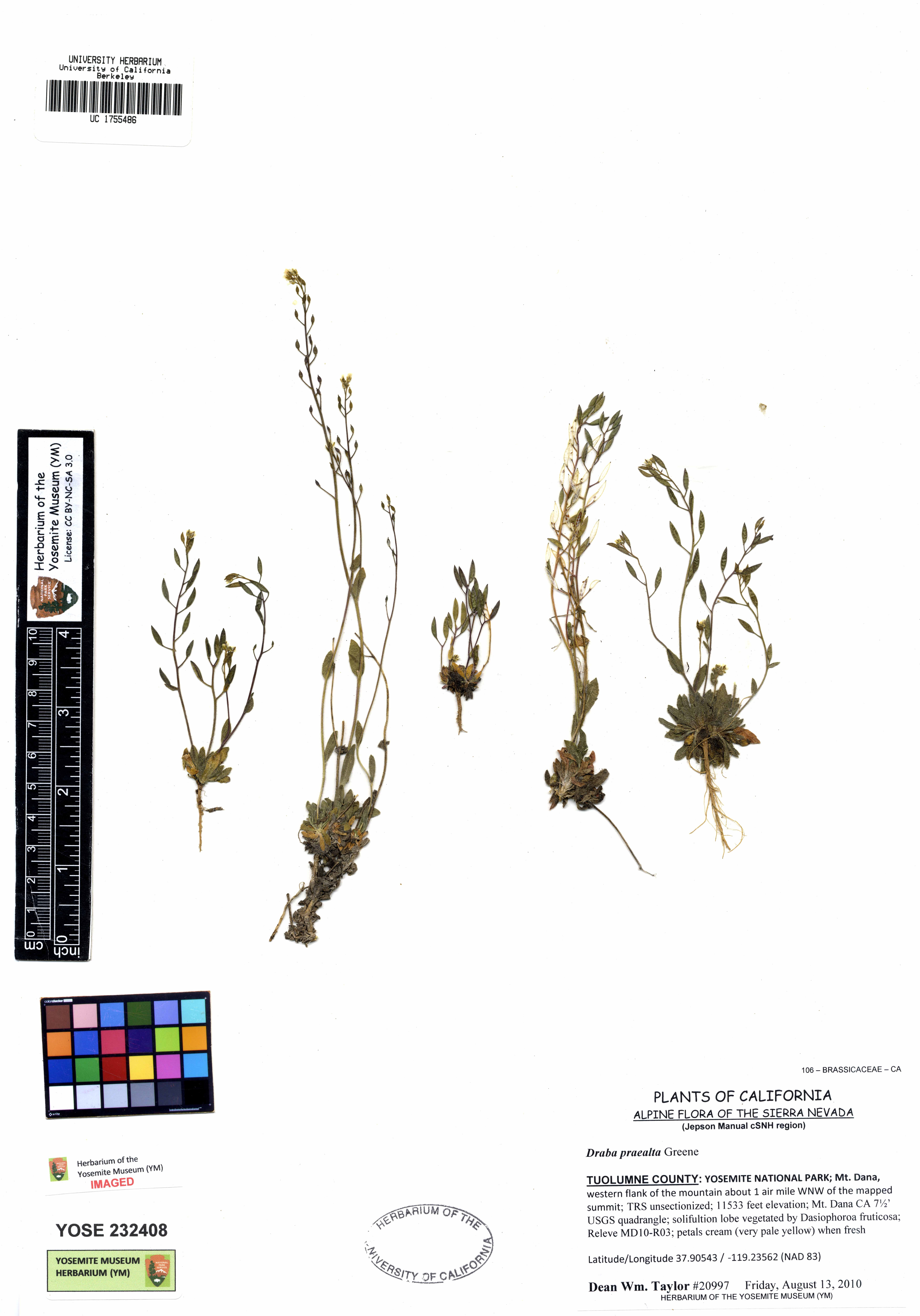 UC1755486 Draba praealta